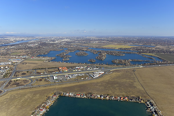 A csepeli tavak légi felvételen